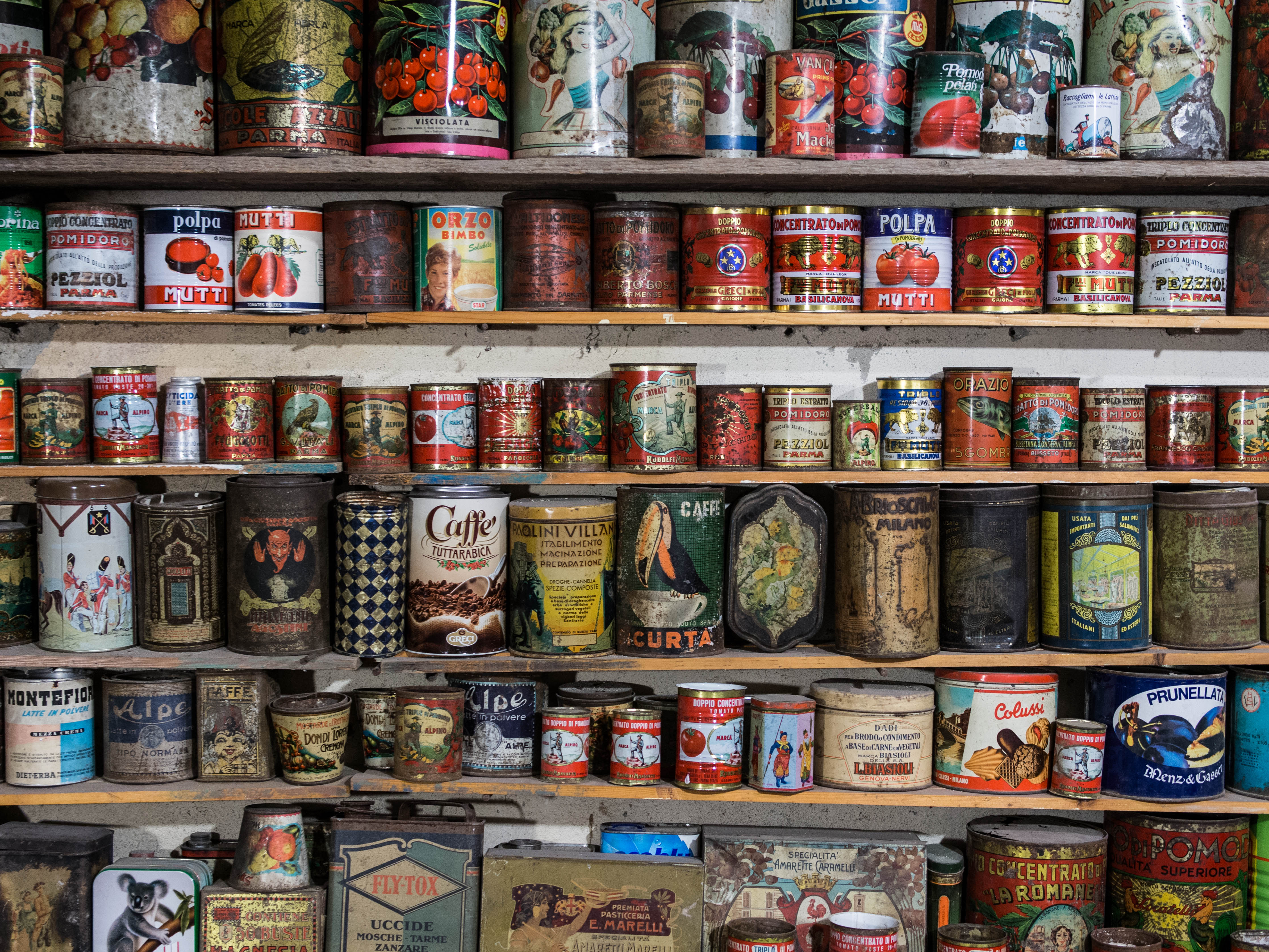 Museo Ettore Guatelli - Collecchio – Italia.